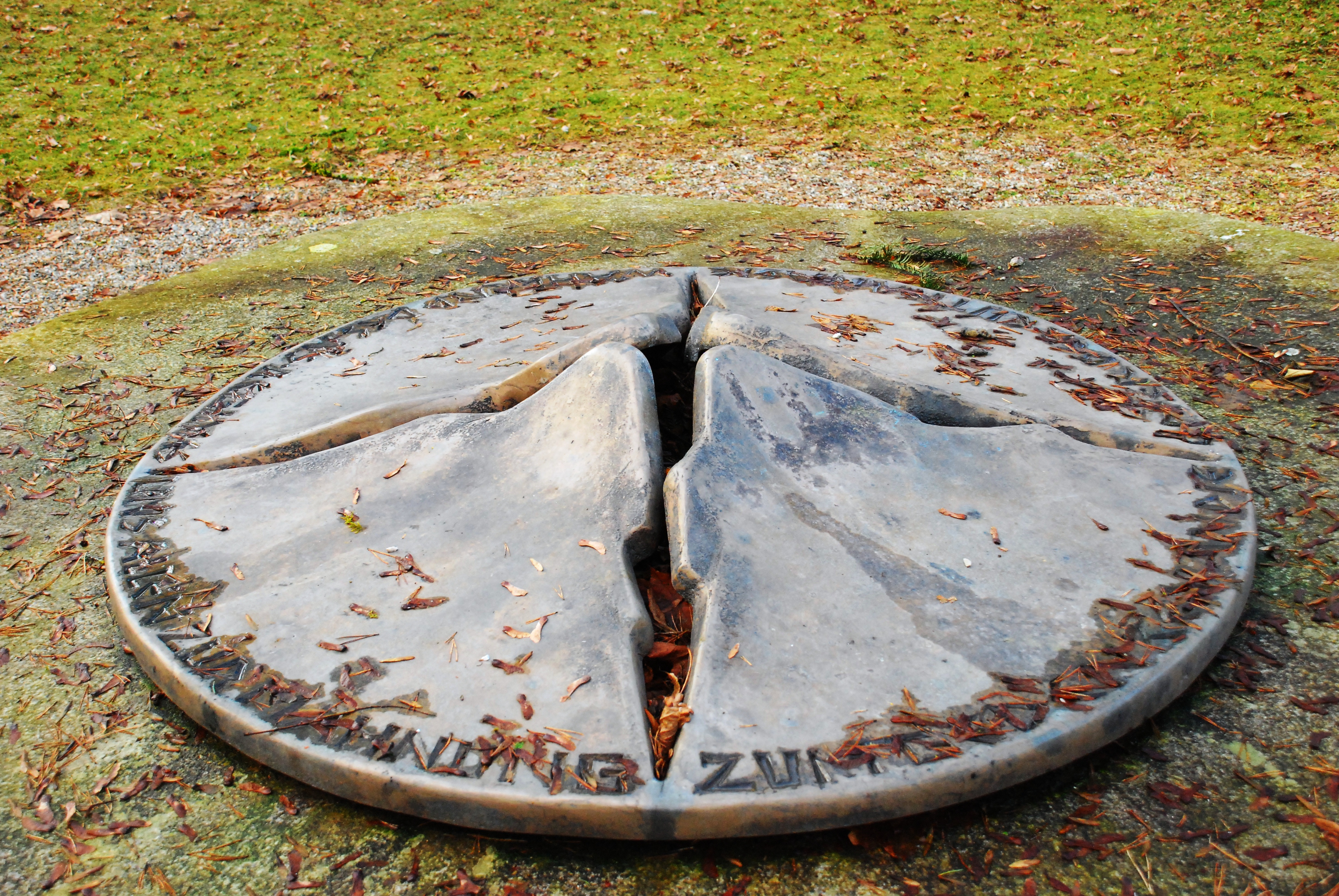 Mahnmal von Josef Golwitzer zum Gedenken an die Opfer der Euthanasie während der NS-Zeit im Bezirkskrankenhaus Haar (heute Isar-Amper-Klinikum München-Ost), eingeweiht am 18. Januar 1990 als 50. Jahrestag des ersten Abtransports von Kranken. Lage östlich der evangelischen Jesuskirche auf dem Gelände des Klinikums in Haar, Landkreis München, Regierungsbezirk Oberbayern, Bayern.